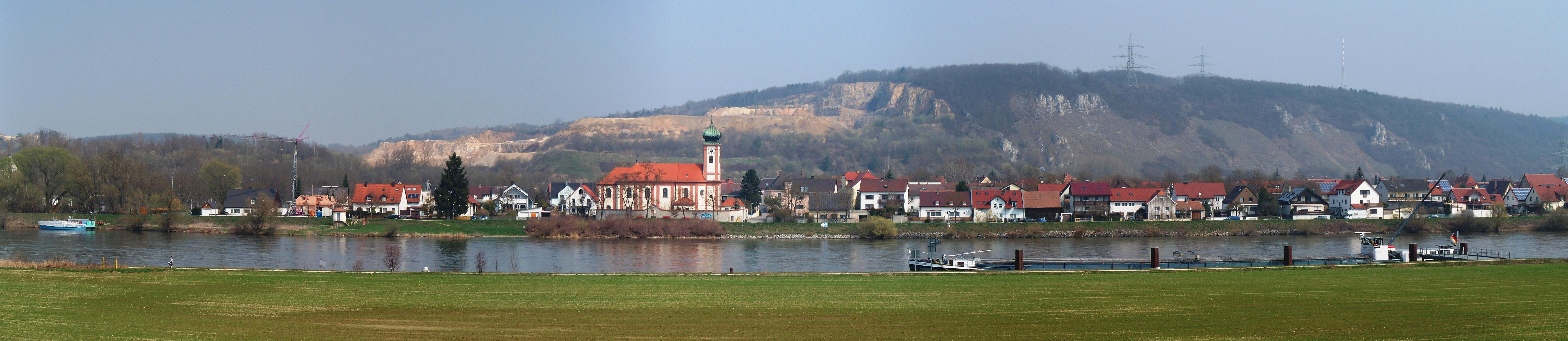 Schwabelweis, an der Donau gelegen, ist ein Stadtbezirk von Regensburg; im Hintergrund der Keilstein.